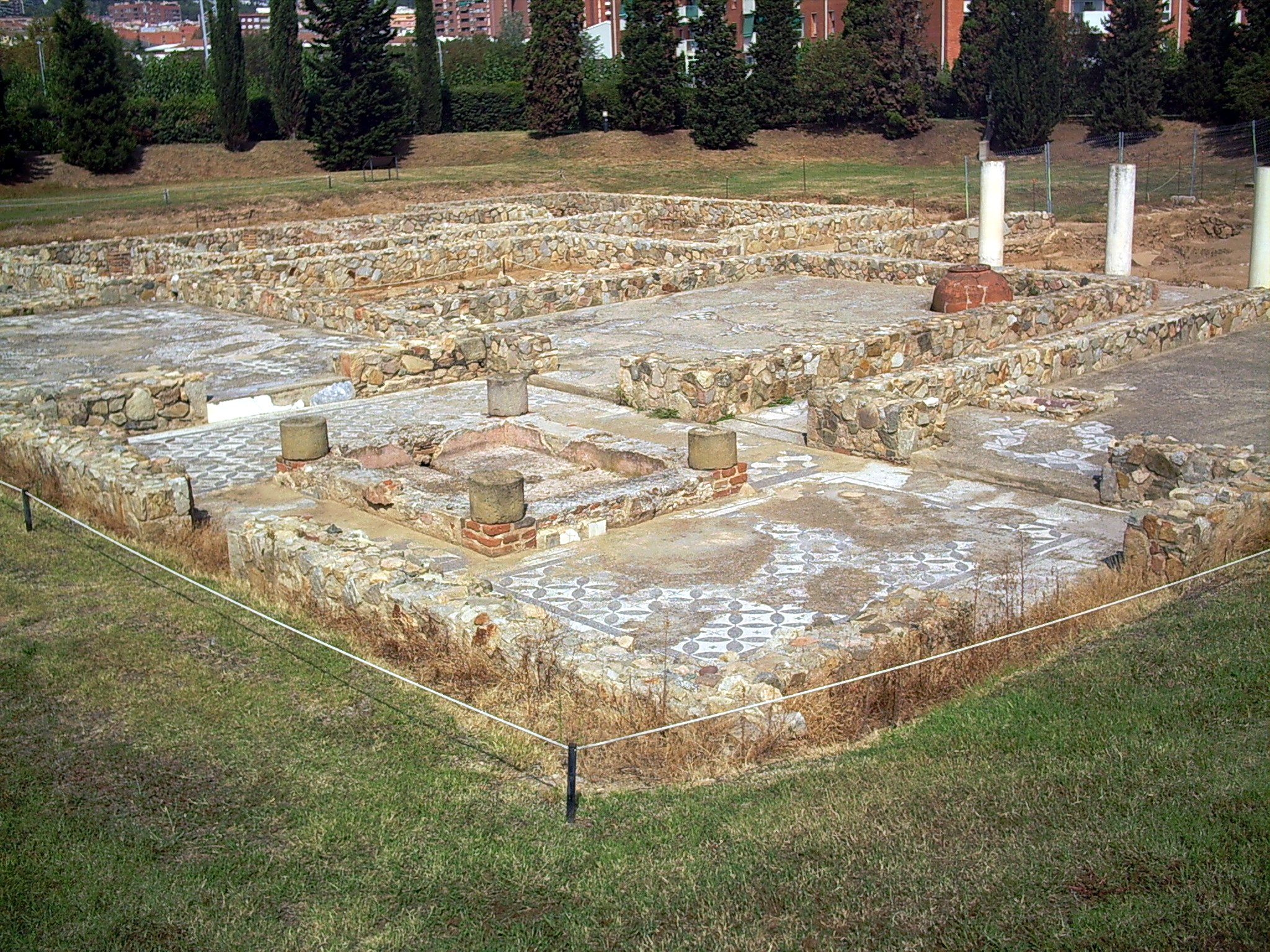 Vil·la romana de Can Llauder, a Mataró, el Maresme, (Catalunya). En primer plà l'atri (implivium)